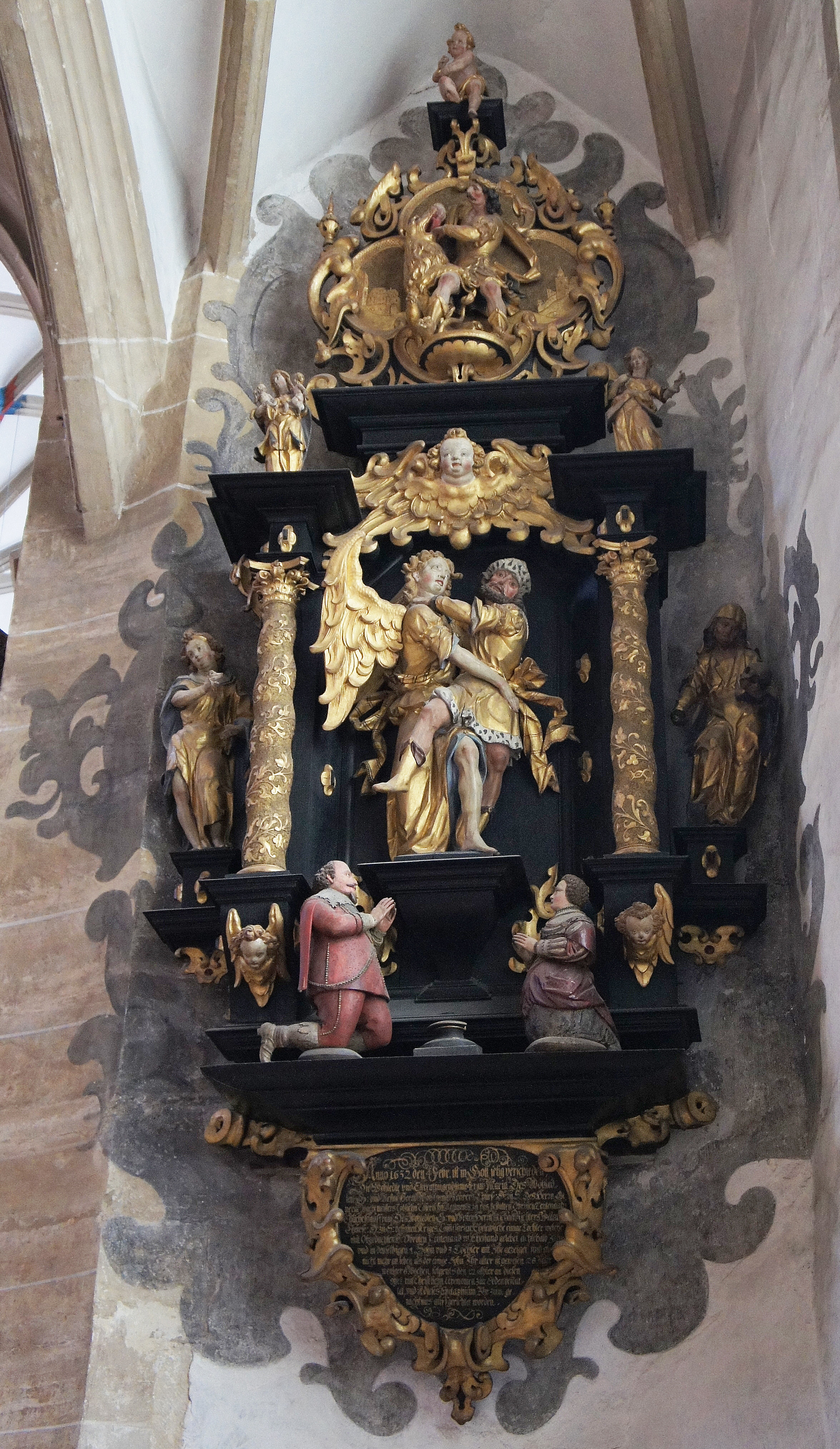 Der Dom zu Freiberg